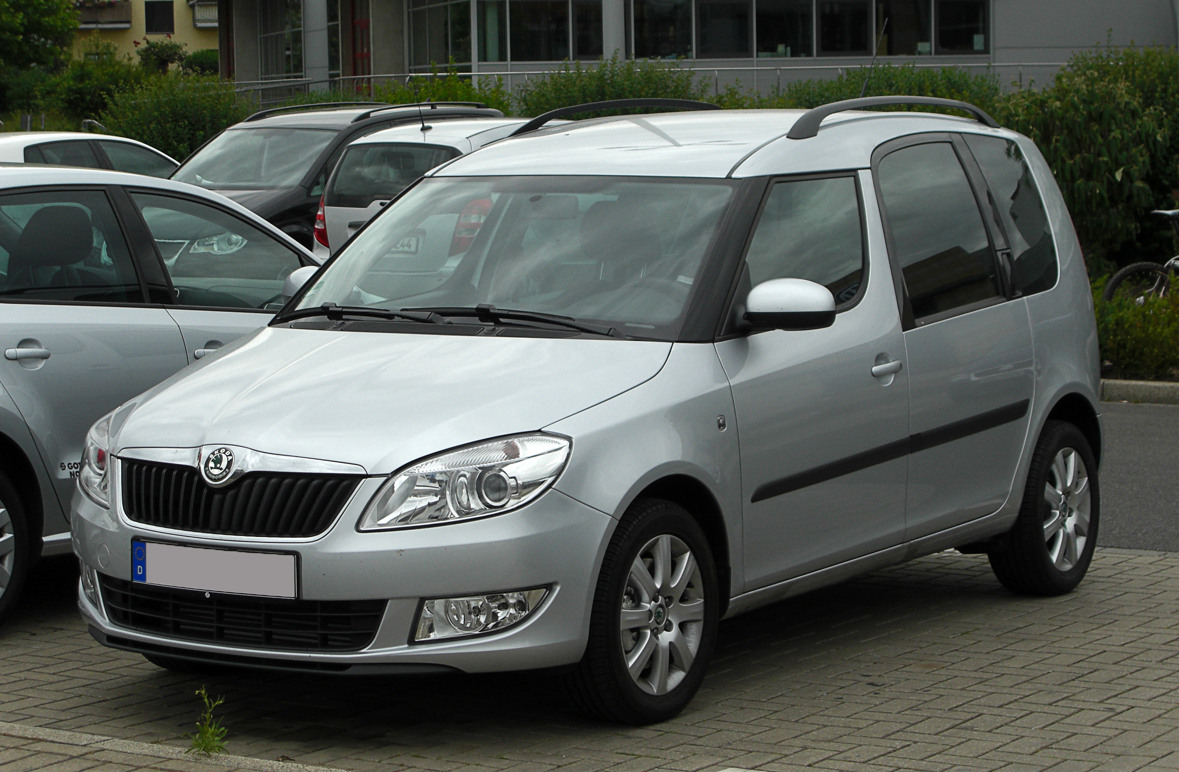 Skoda Roomster (Facelift)